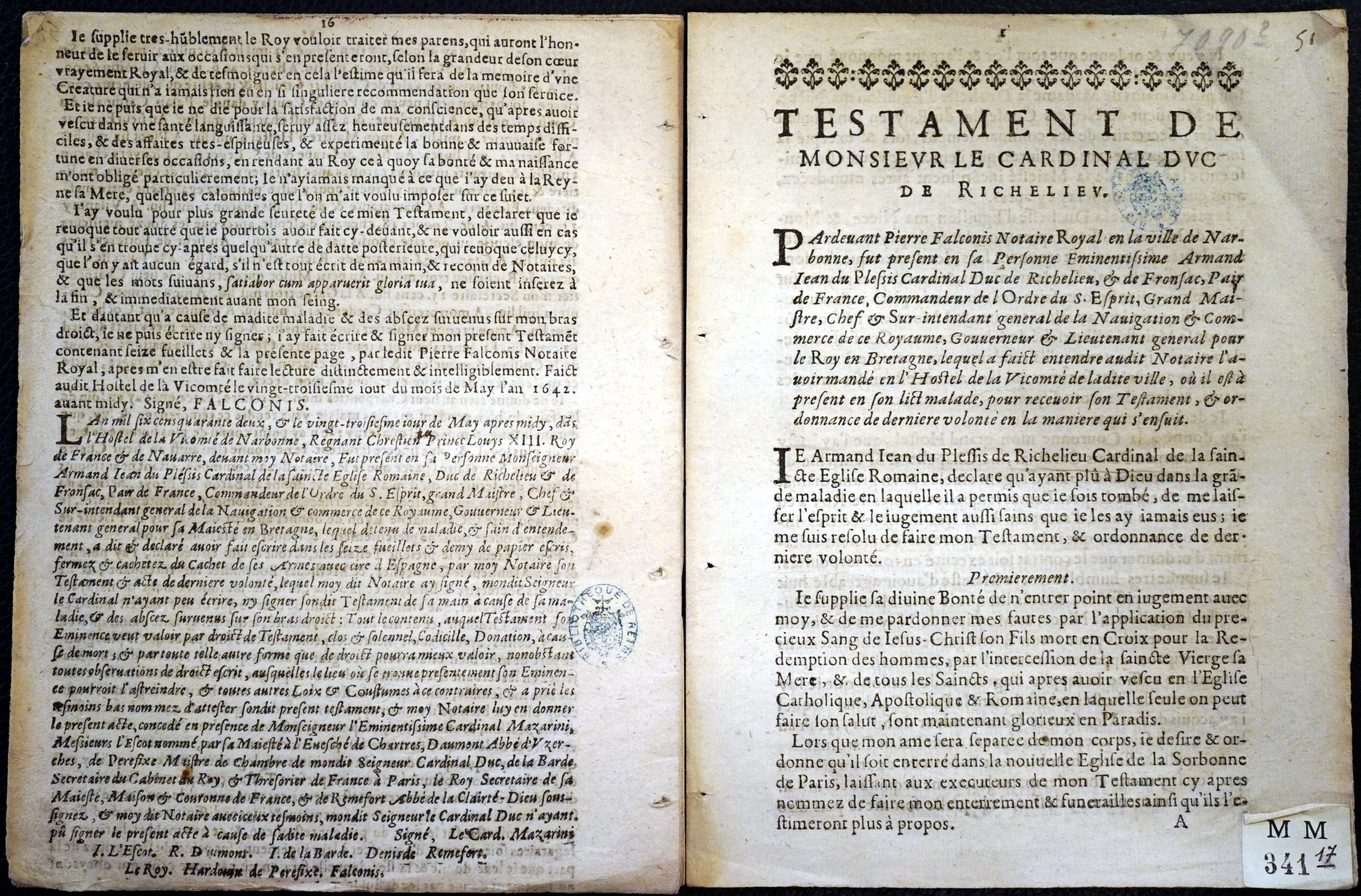 extrait des Mémoires de Madame la marquise de La Rochejaquelein".